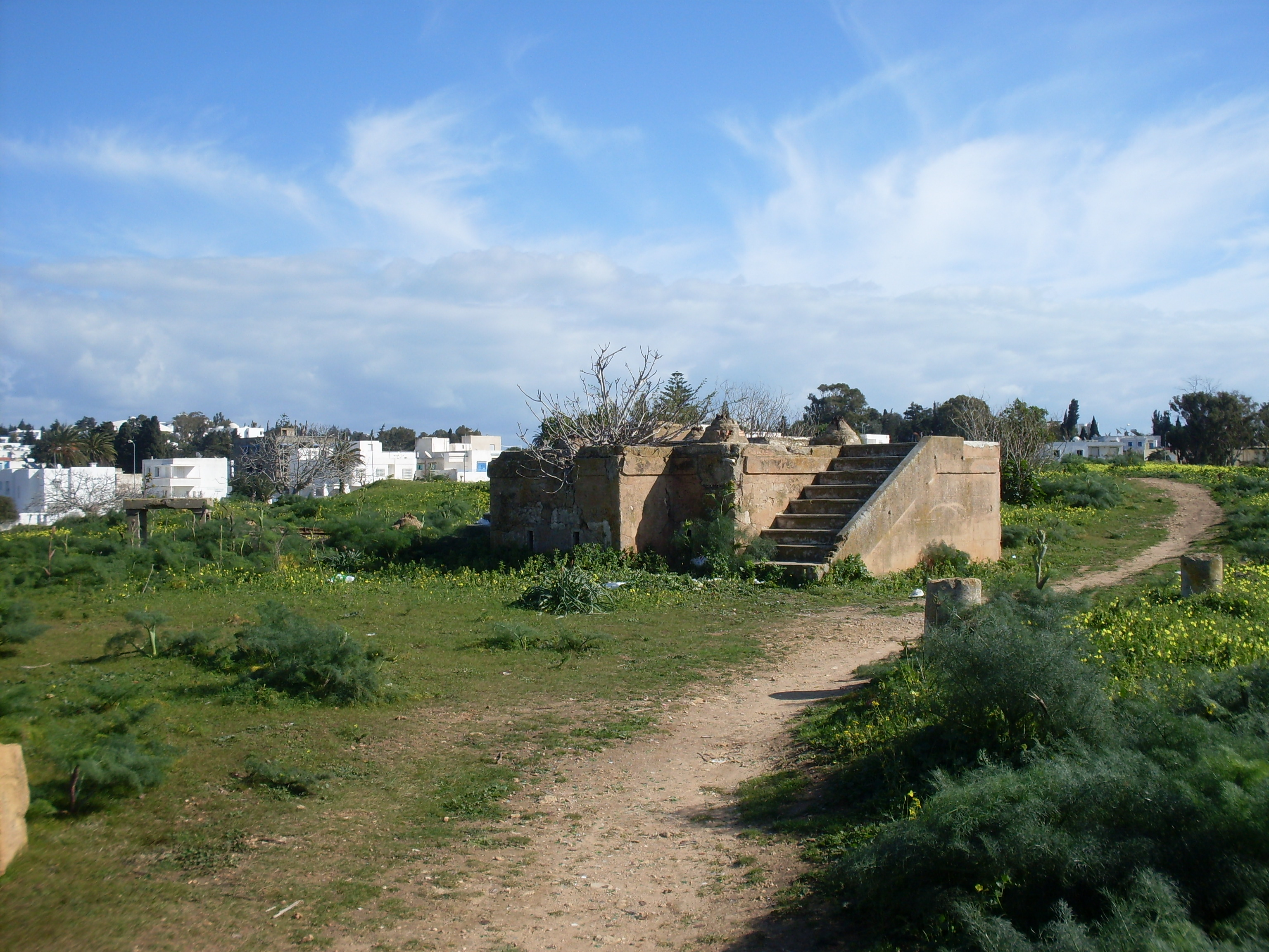 Tunisie, Confession de la basilique majorum de Carthage